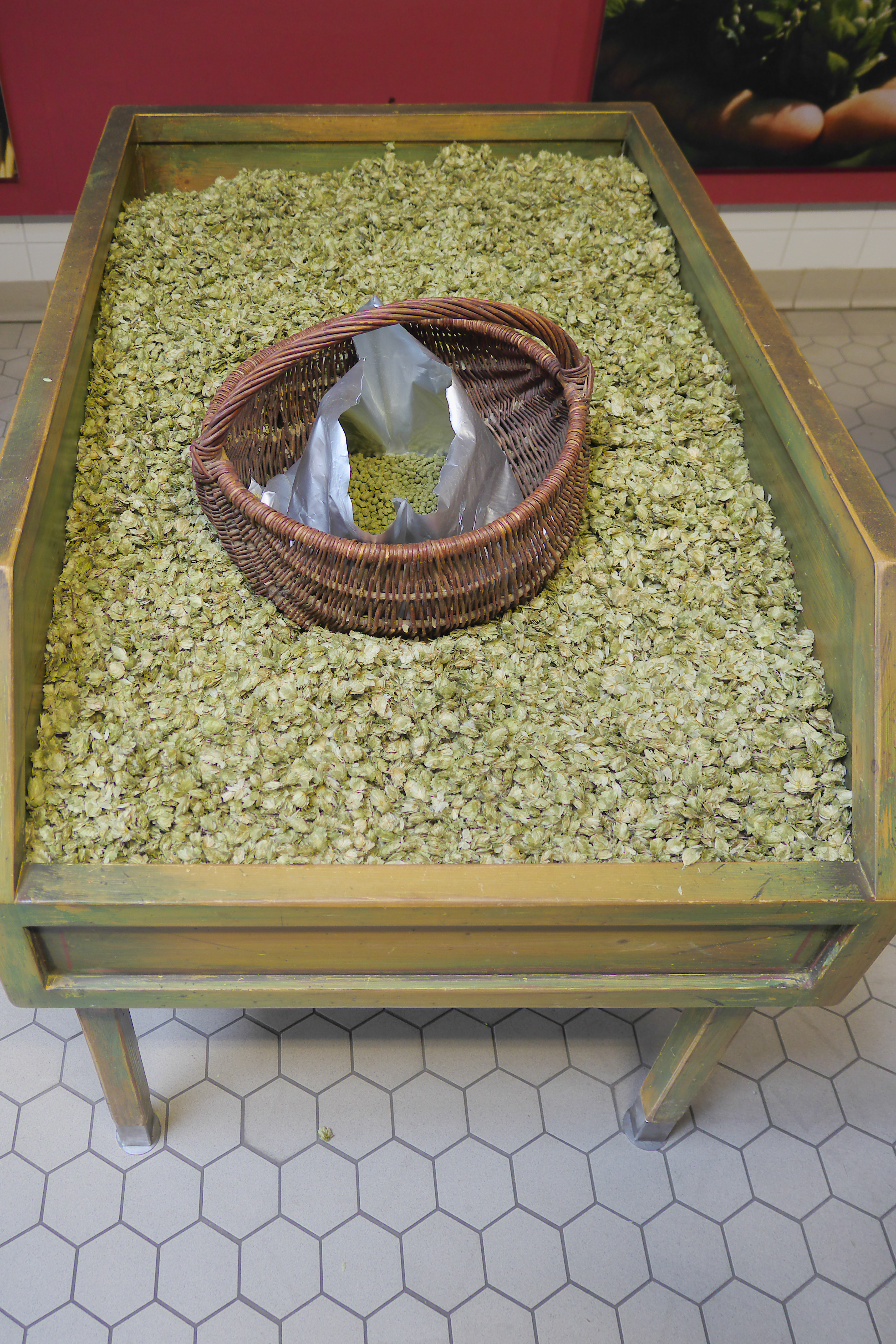 Hopfentisch mit getrocknetem Hopfen und gepressten Hopfenpellets im Korb, Brauerei Aying, Bayern, Deutschland